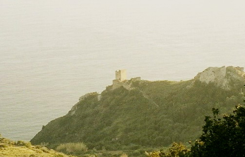 La Torre della Maddalena a Monte Argentario: foto scattata da apparecchio non digitale e successivamente modificata.